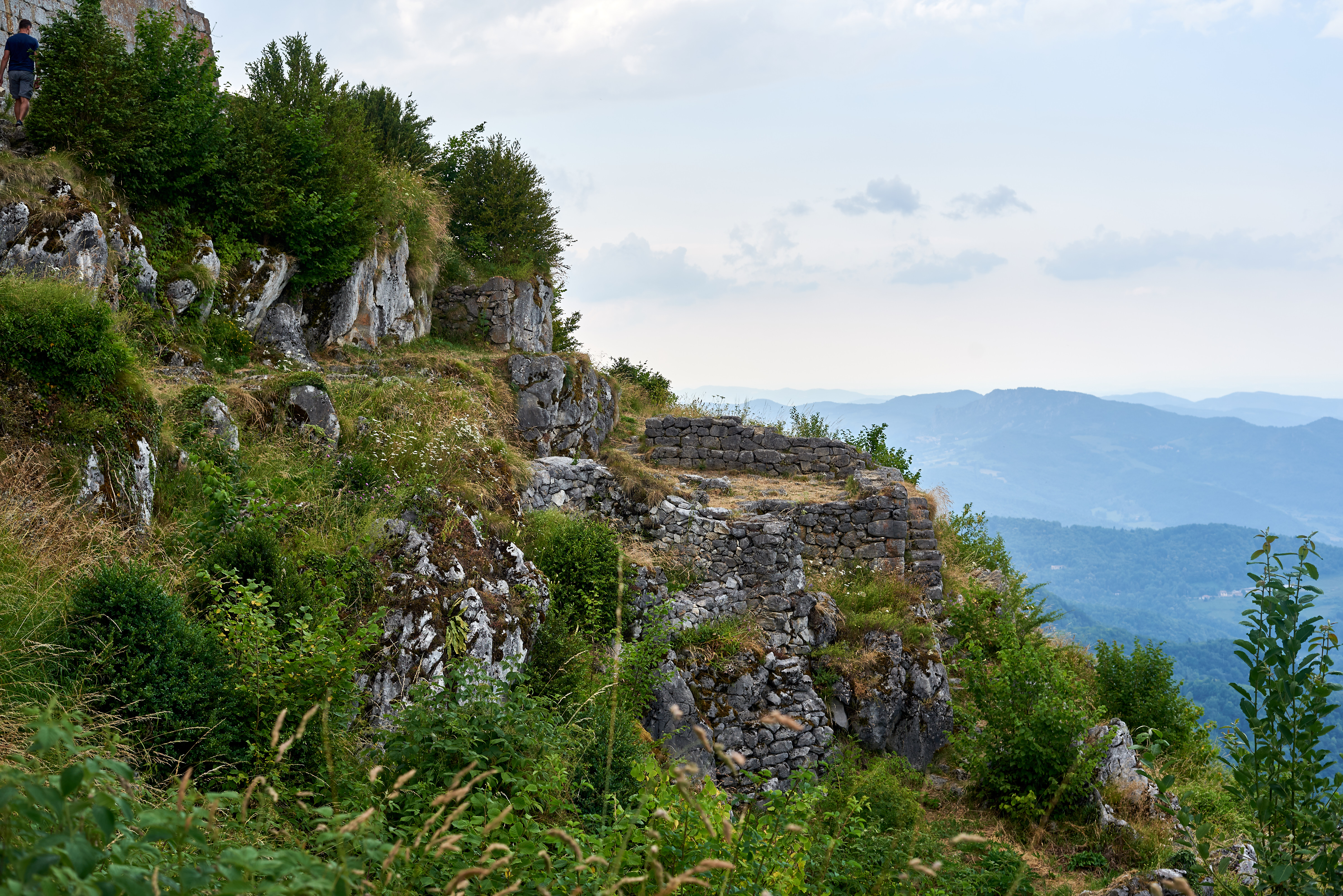 Vestigis del poble càtar al costat del castell.